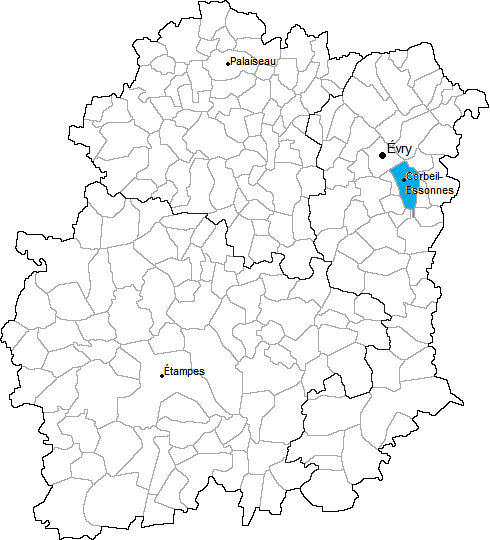 Carte de localisation du canton de Corbeil-Essonnes-Est en Essonne (91)